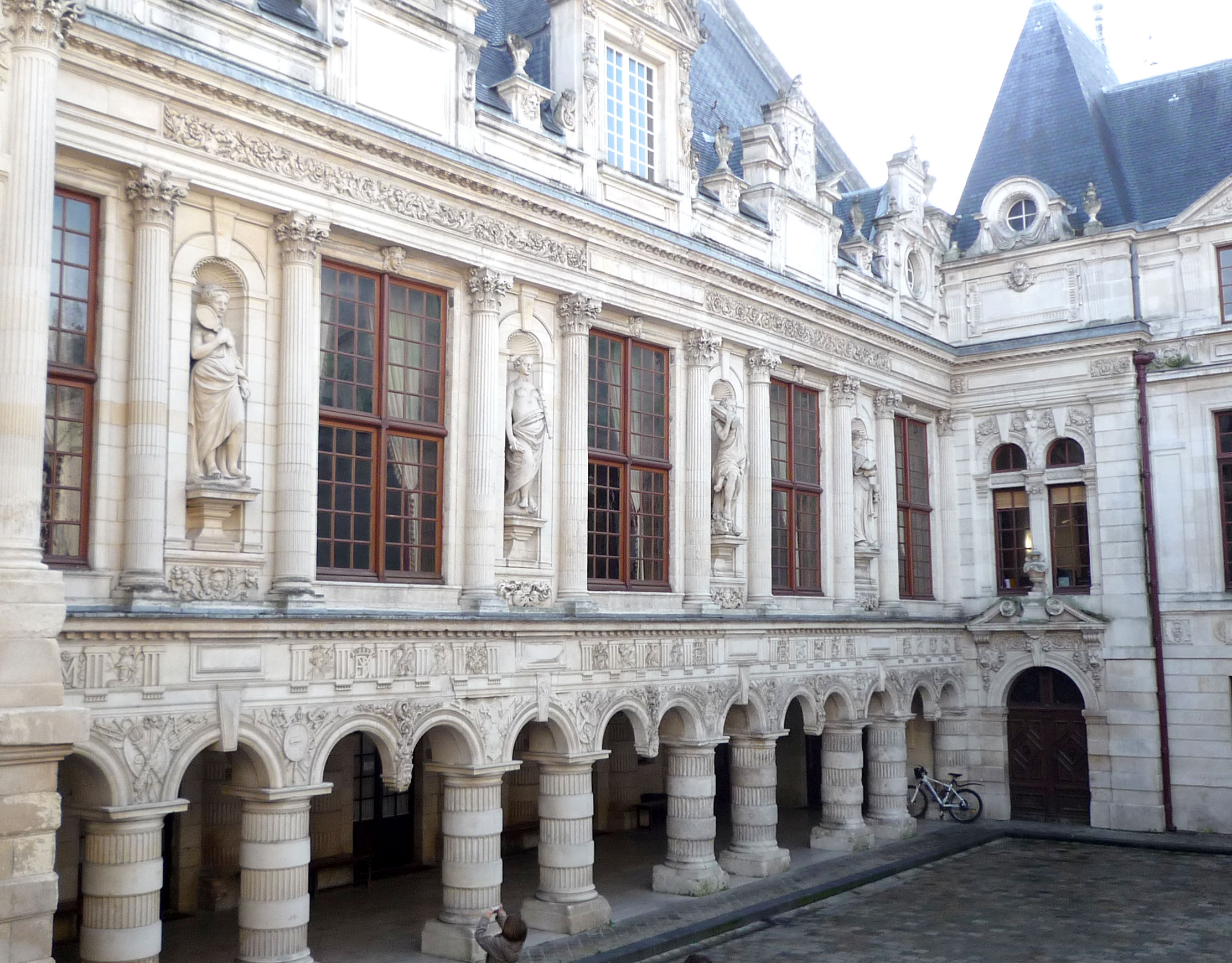 La Rochelle, Hôtel de Ville 04